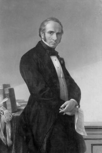 Portrait de Louis Jamme datant de 1878